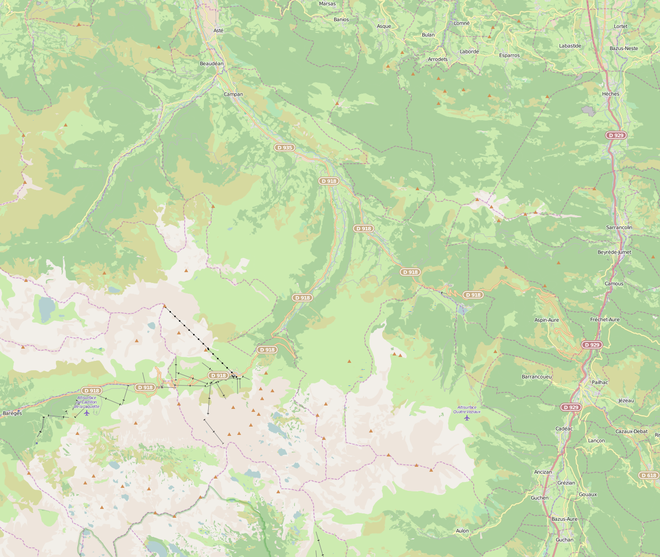 Carte OpenStreetMap de la commune de Campan, extrait de septembre 2015